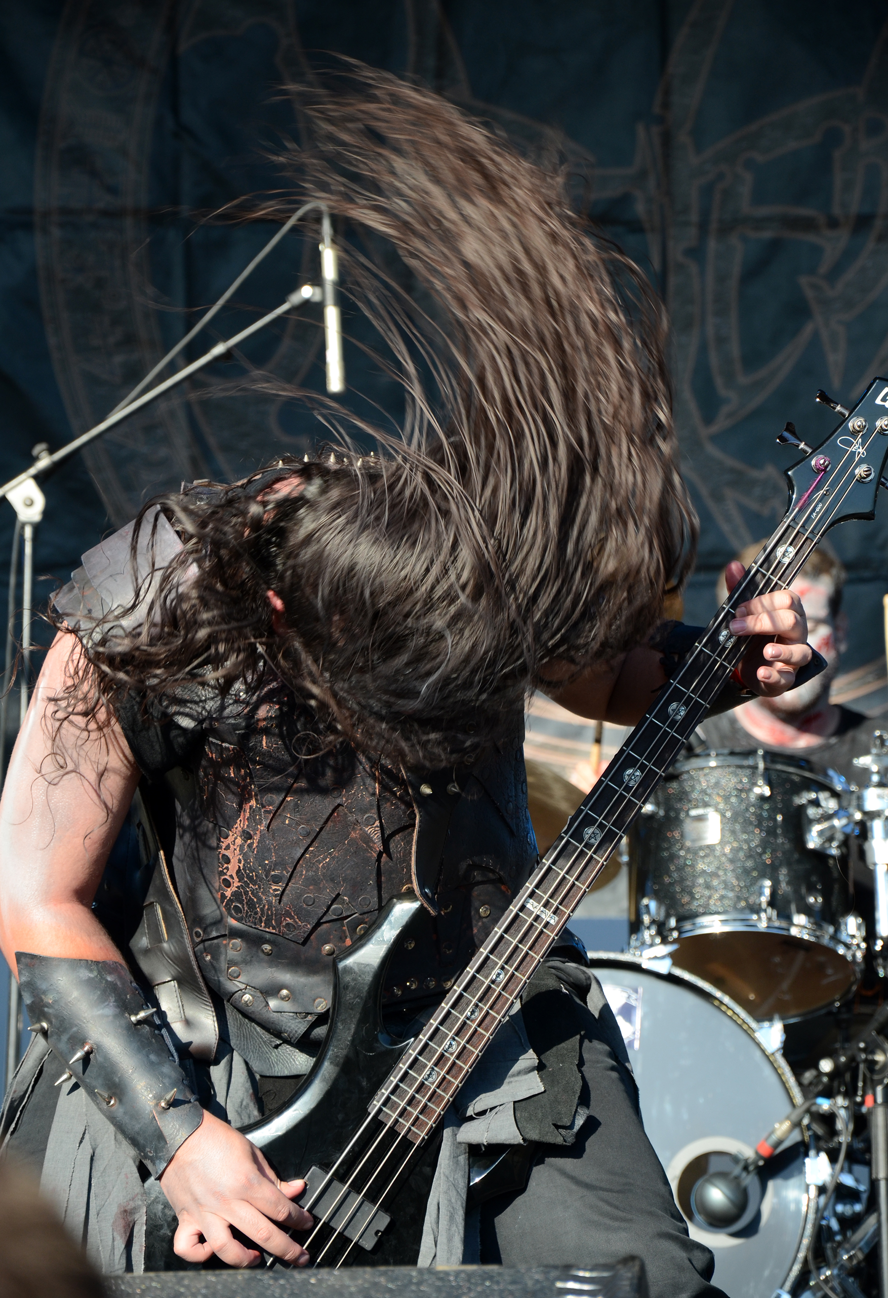 Noctem, un groupe de Black Metal espagnol, au Motocultor Festival, à Theix, en Bretagne, le 18 Août 2012.